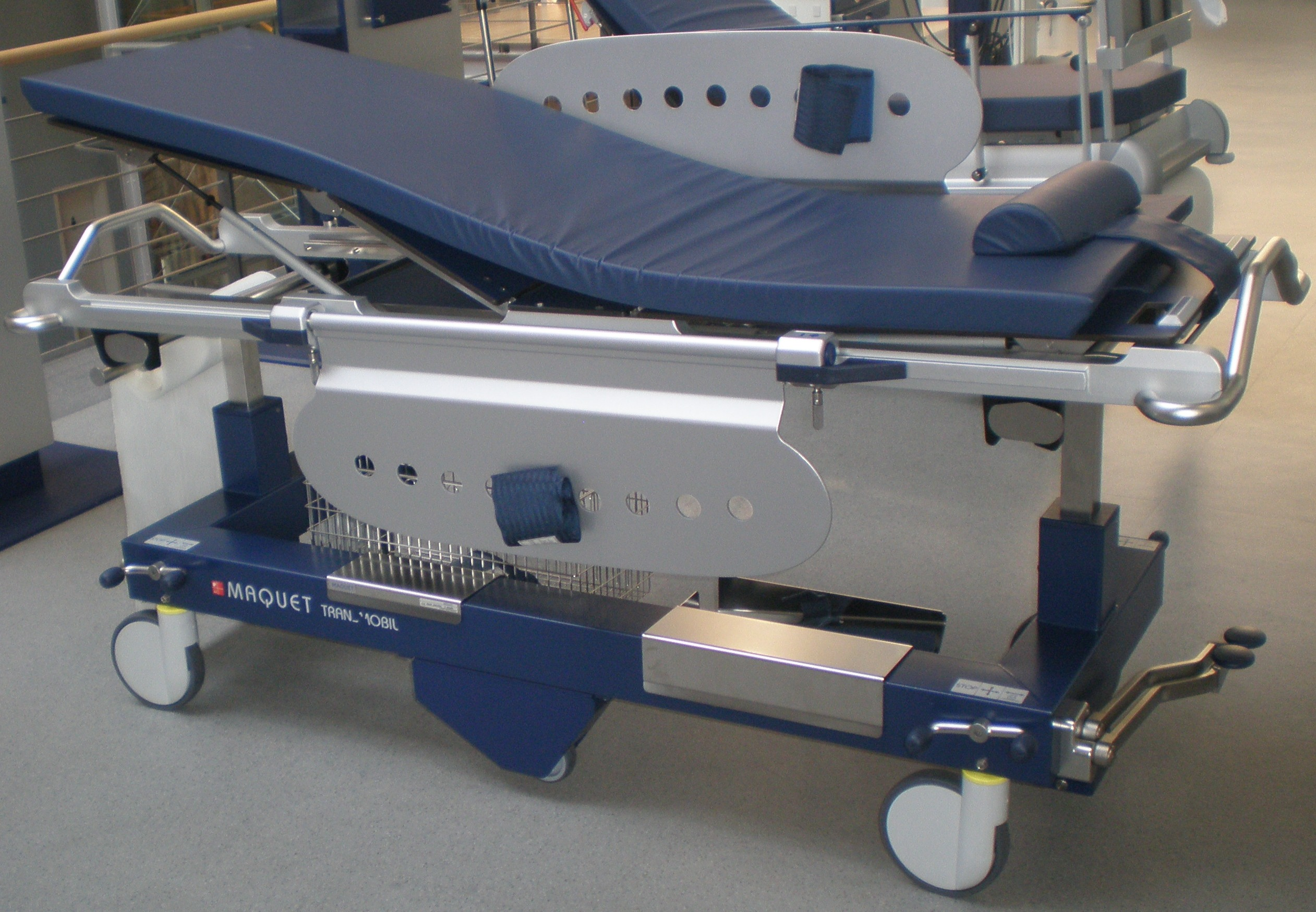 Медицинская реанимационная каталка TRANSMOBILE MAQUET